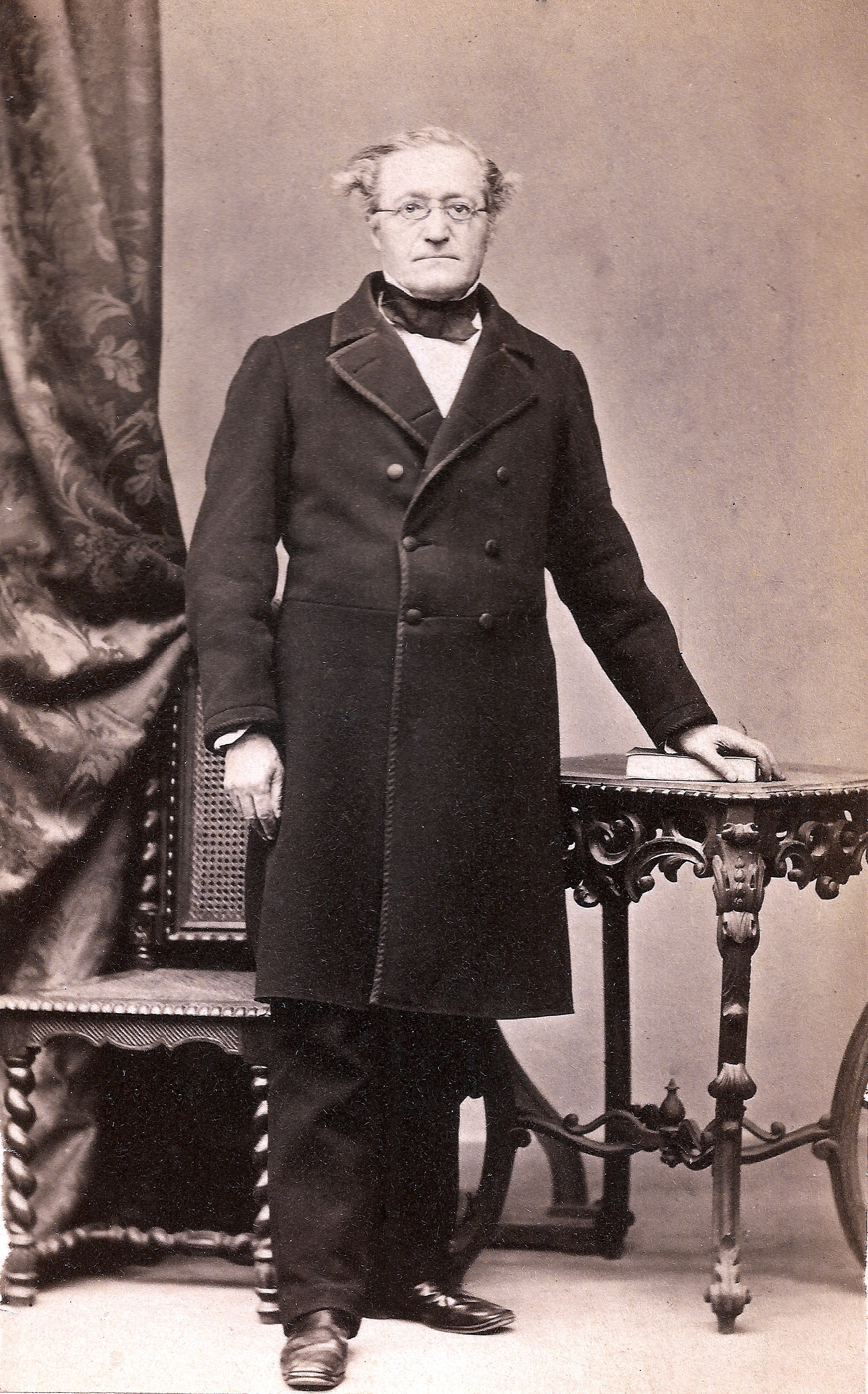 Johannes Mährlen ∞ Elise Conradi, auf einer Carte de Visite, Fotografie Atelier Buchner Stuttgart, Abzug auf Albuminpapier